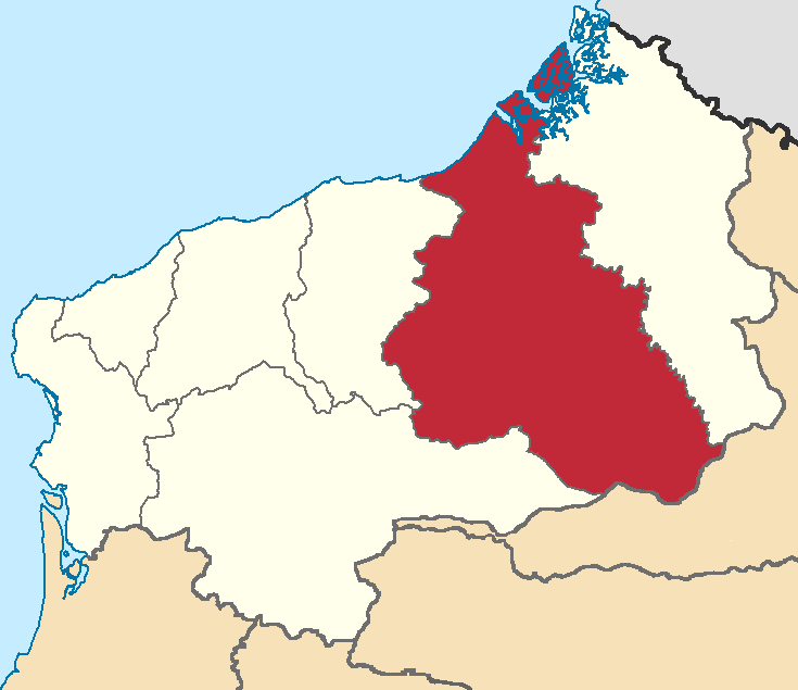 Mapa localizacor del cantón Eloy Alfaro, Esmeraldas, Ecuador